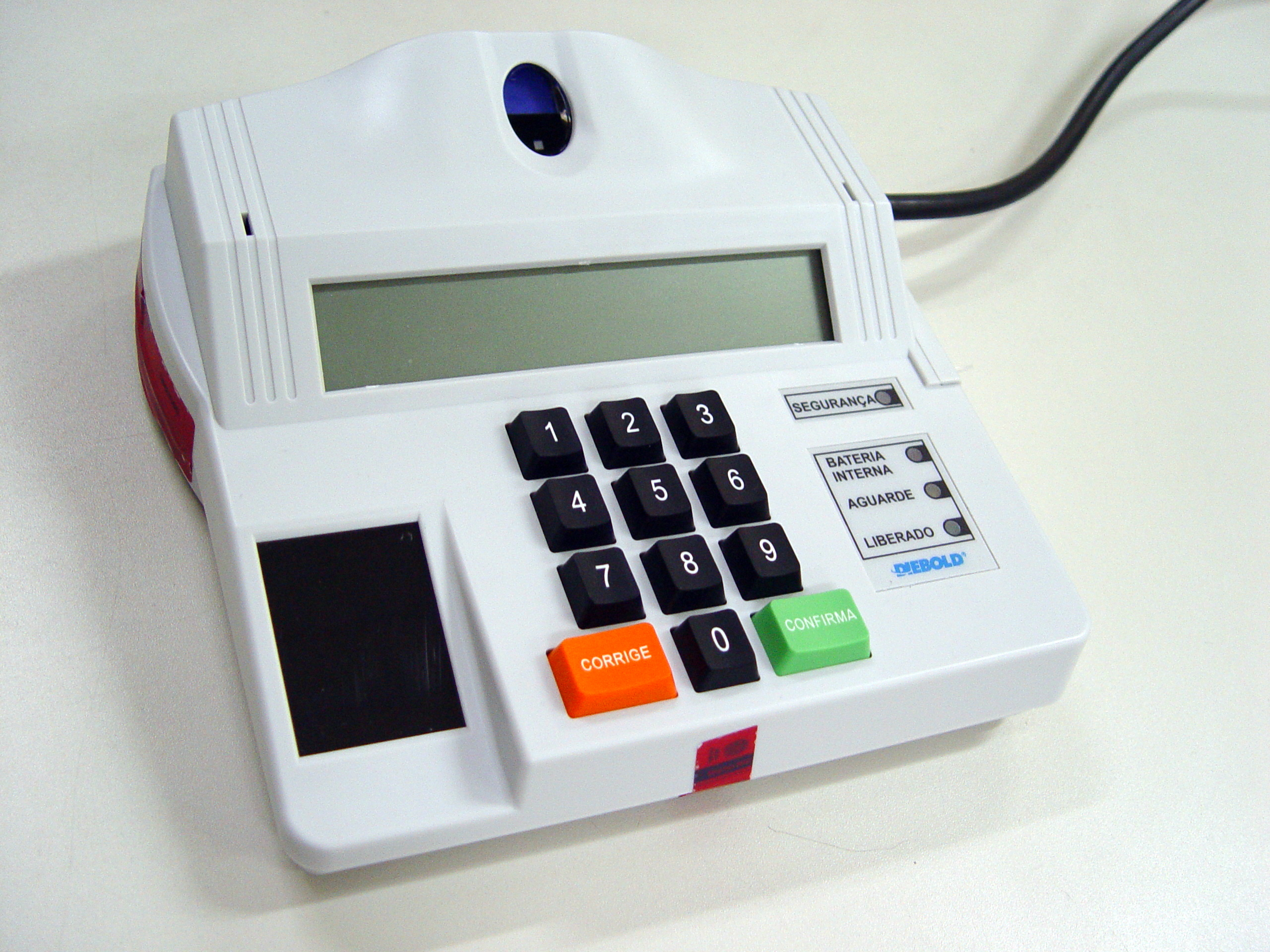 Terminal do mesário (anteriormente conhecido como Microterminal, ou MT) da urna eletrônica brasileira modelo 2009 (UE2009). Este modelo de urna destaca-se dos modelos anteriores pela presença de um dispositivo de entrada de cartão inteligente (smart card) e de uma tela de LCD para exibição da foto do eleitor. Tal como o modelo UE2008, possui ainda um dispositivo de identificação biométrica que realiza uma coleta do tipo "batida". As etiquetas em vermelho são lacres do tipo VOID, utilizados pela primeira vez nas eleições gerais no Brasil em 2010, assim como o próprio modelo UE2009. This is a retouched picture, which means that it has been digitally altered from its original version. Modifications: Ferramenta "Estou com Sorte" do Picasa. ("I'm Feeling Lucky" tool from Picasa.).